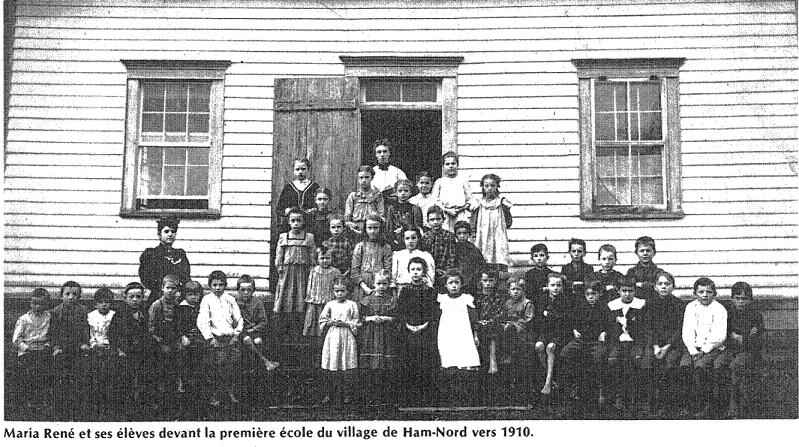 Maria René et ses élèves devant la première école du village de Ham-Nord vers 1910.